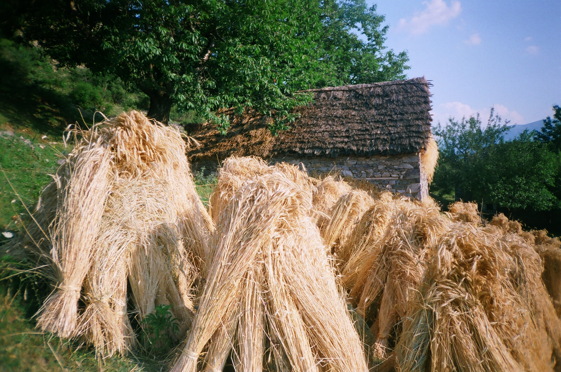 Kapulet e thekres pas korrjes Kollovoz